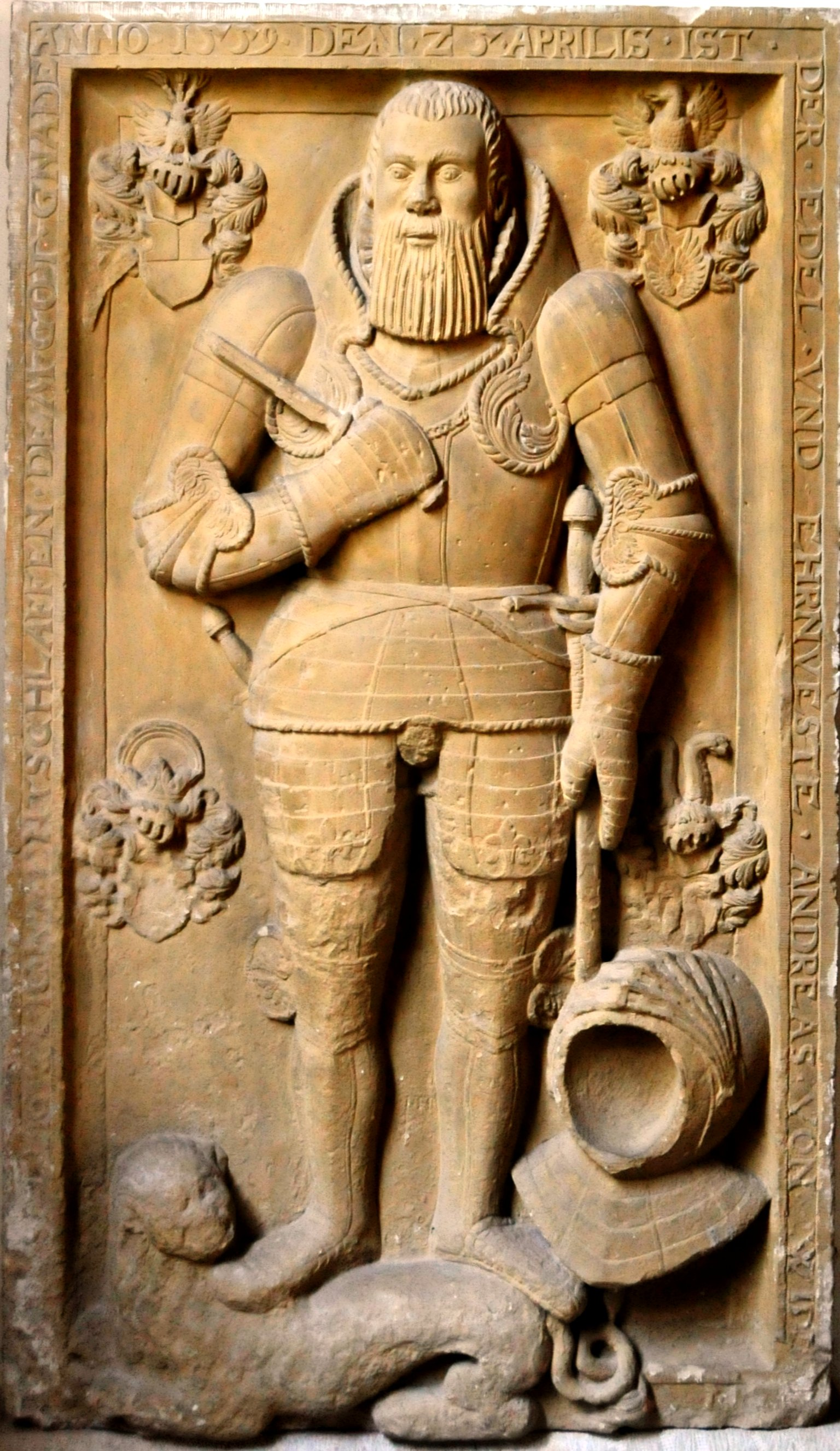 Dietendorf, Kirche, Grabplatte des Herrn von Widdern